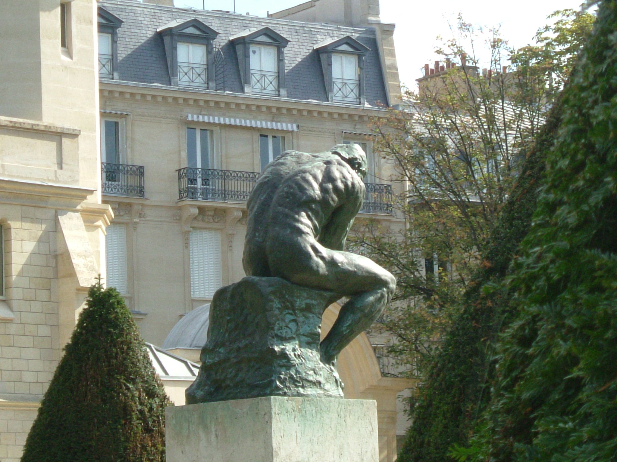 Rückansicht des "Denkers" von Auguste Rodin im Garten des Musée Rodin